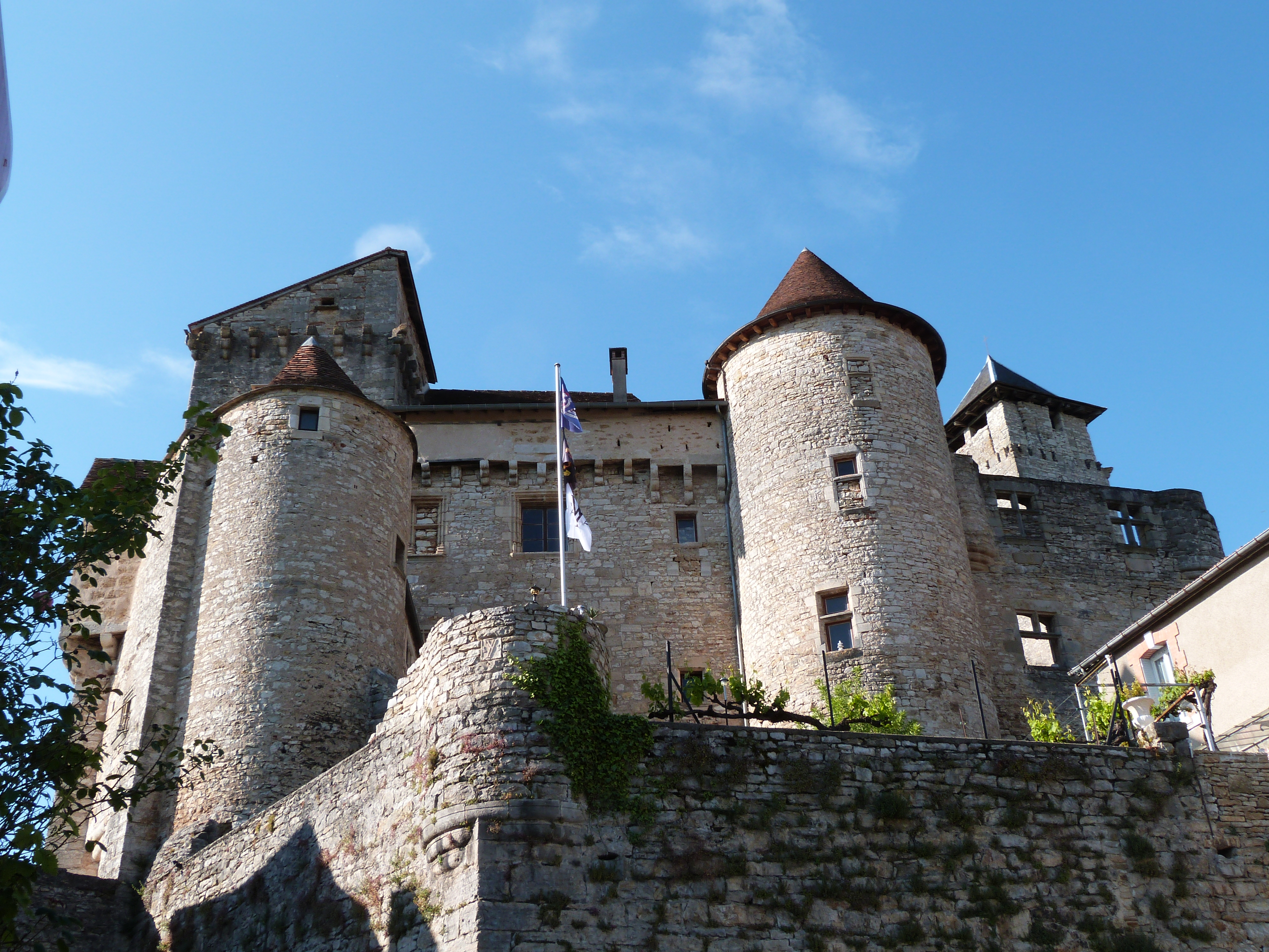 Château de Salvagnac-Cajarc (InscritClassé) .